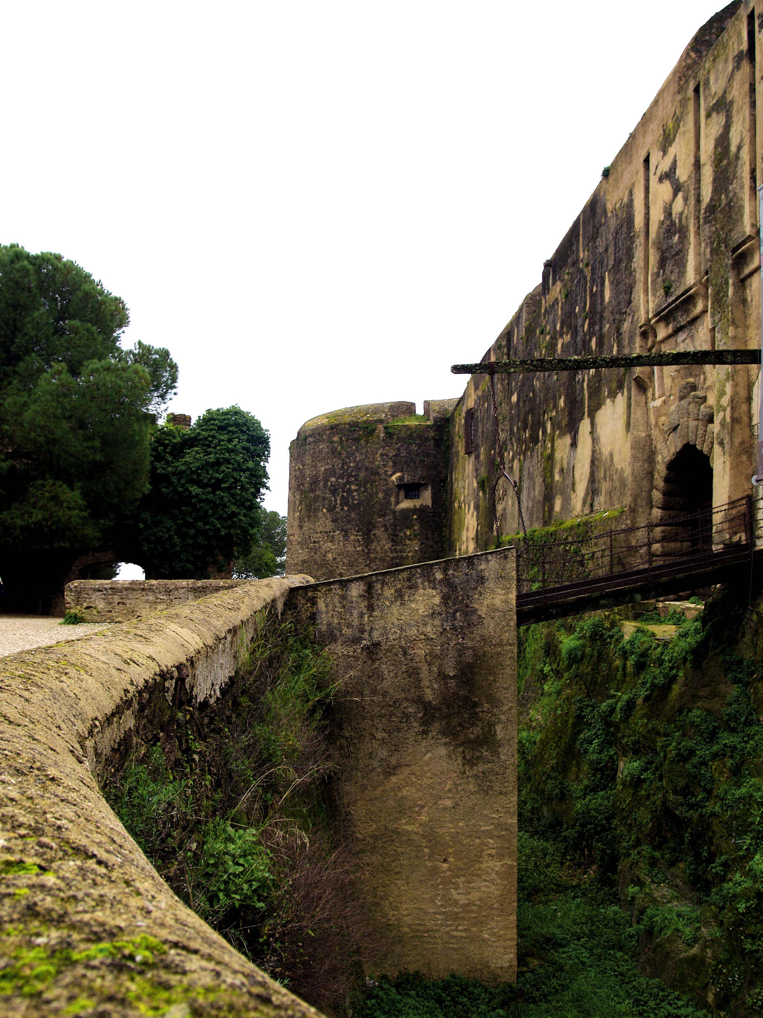 Fortress of Vila Viçosa, Portugal